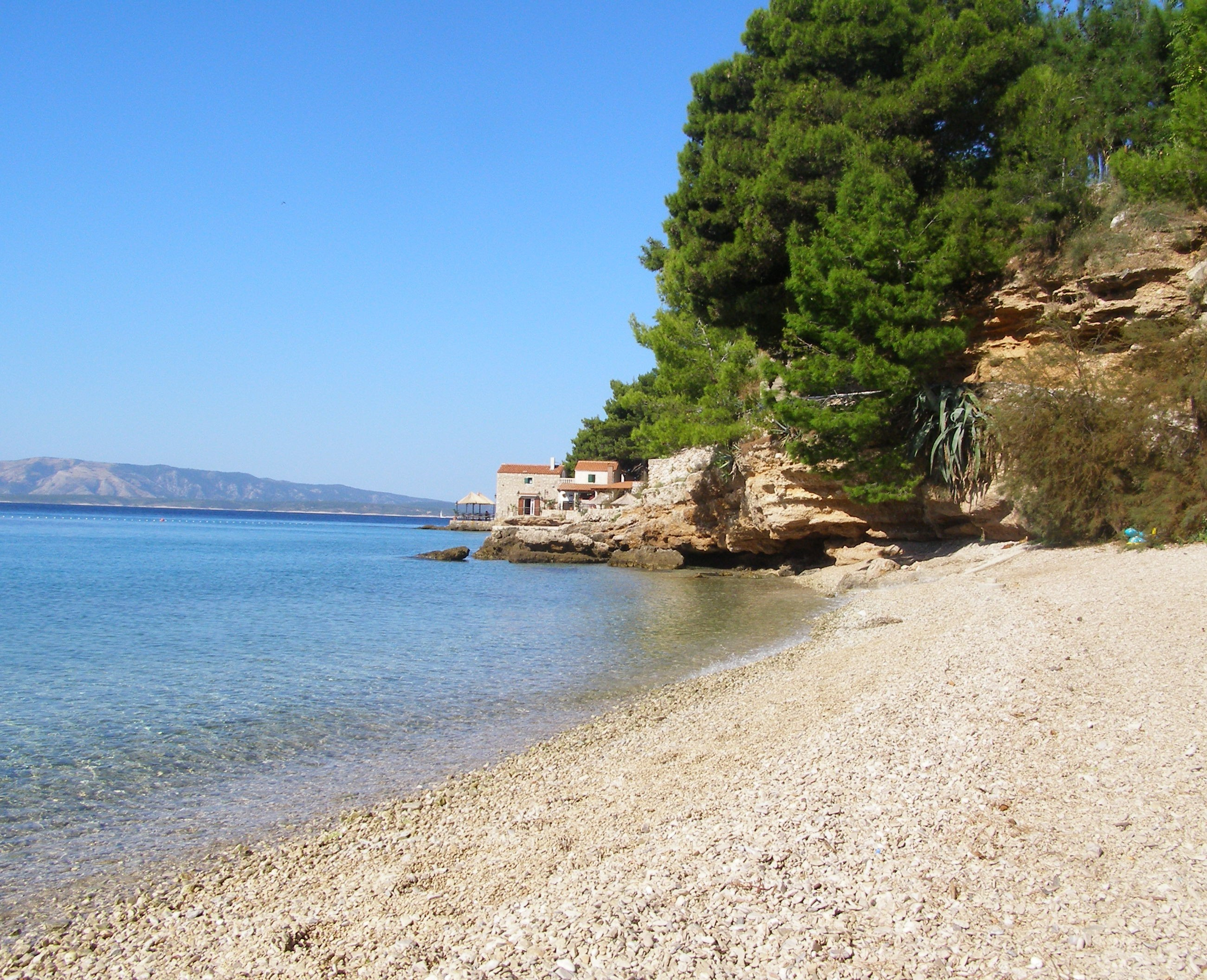 Beach Bijela Kuca, Bol, Brac, Croatia